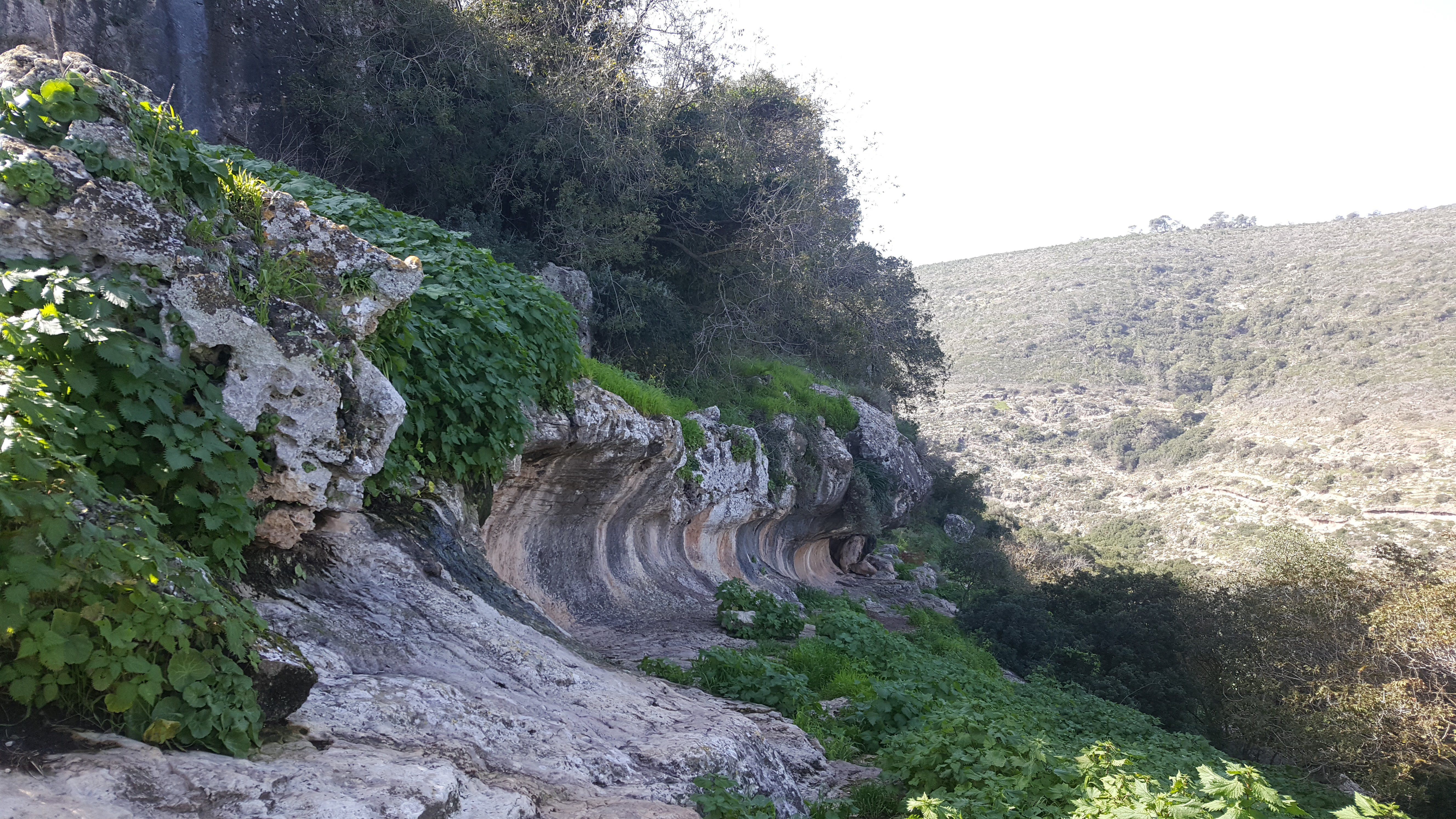 נַחַל אורן (בערבית: ואדי פלאח) הוא נחל הזורם בהר הכרמל. תחילתו ברום 420 מטר מעל פני הים, ליד קו פרשת המים המרכזית של הכרמל באזור "חורבת מעצרה", כשני קילומטר מדרום-דרום-מזרח לעספיא. אורכו כ-14 ק"מ, והוא נשפך לים התיכון צפונית לעתלית. נחל אורן הוא הגדול באגני הניקוז המערבי של הכרמל. שטח אגן הניקוז מגיע לכ-35 קמ"ר.